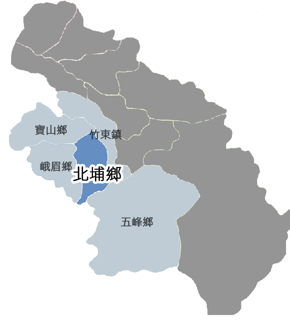 中文（台灣）: 北埔鄉相對位置。